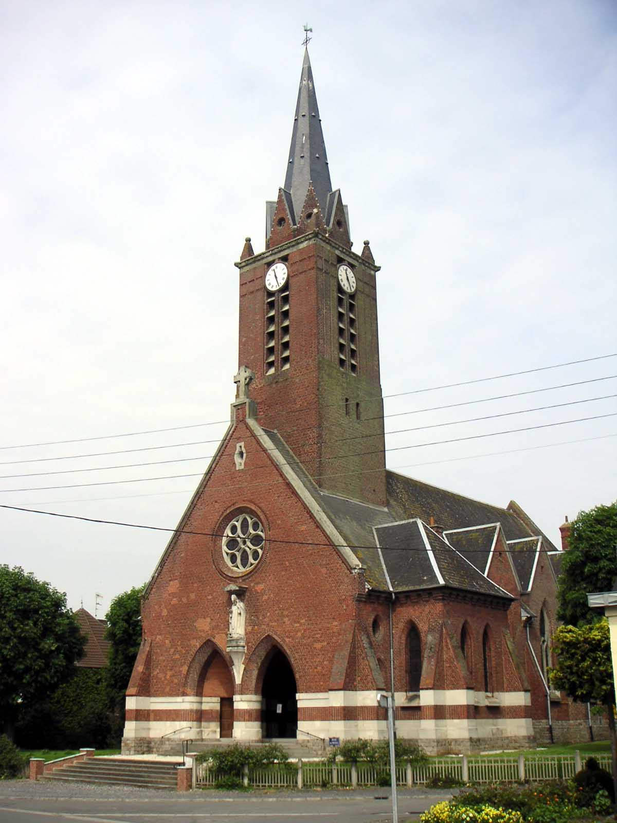 Vue de la facade de l'église d'Épinoy (Pas-de-Calais) image prise par Padawane le 19 mai 2005 (pas de ©)